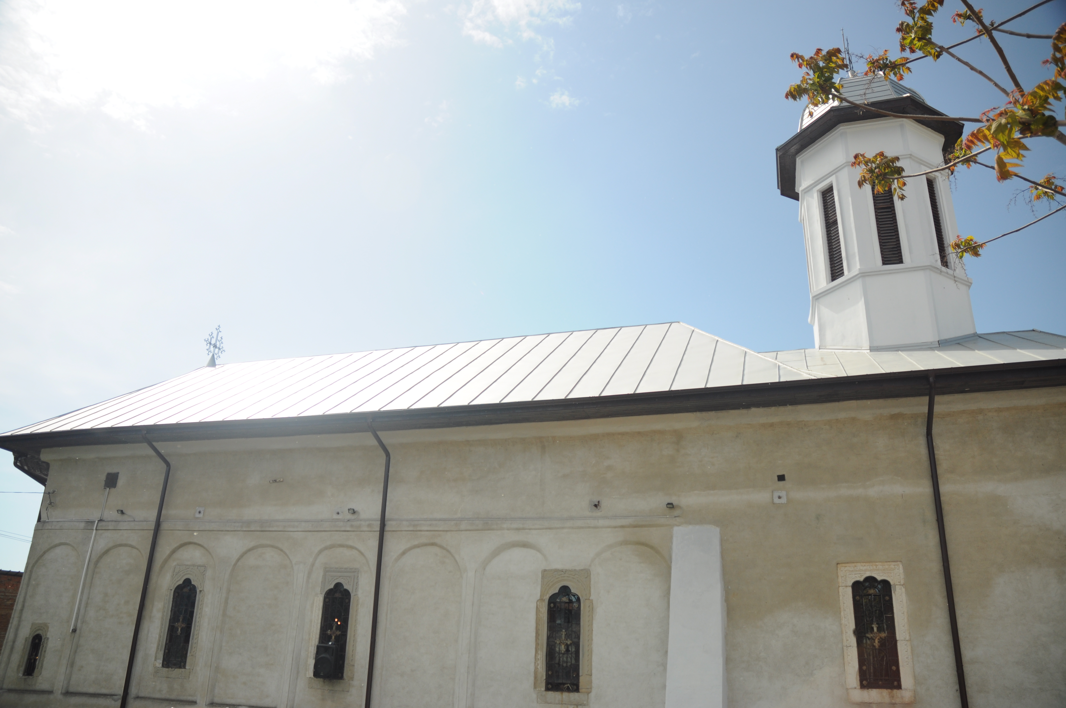 Biserica "Adormirea Maicii Domnului" 02